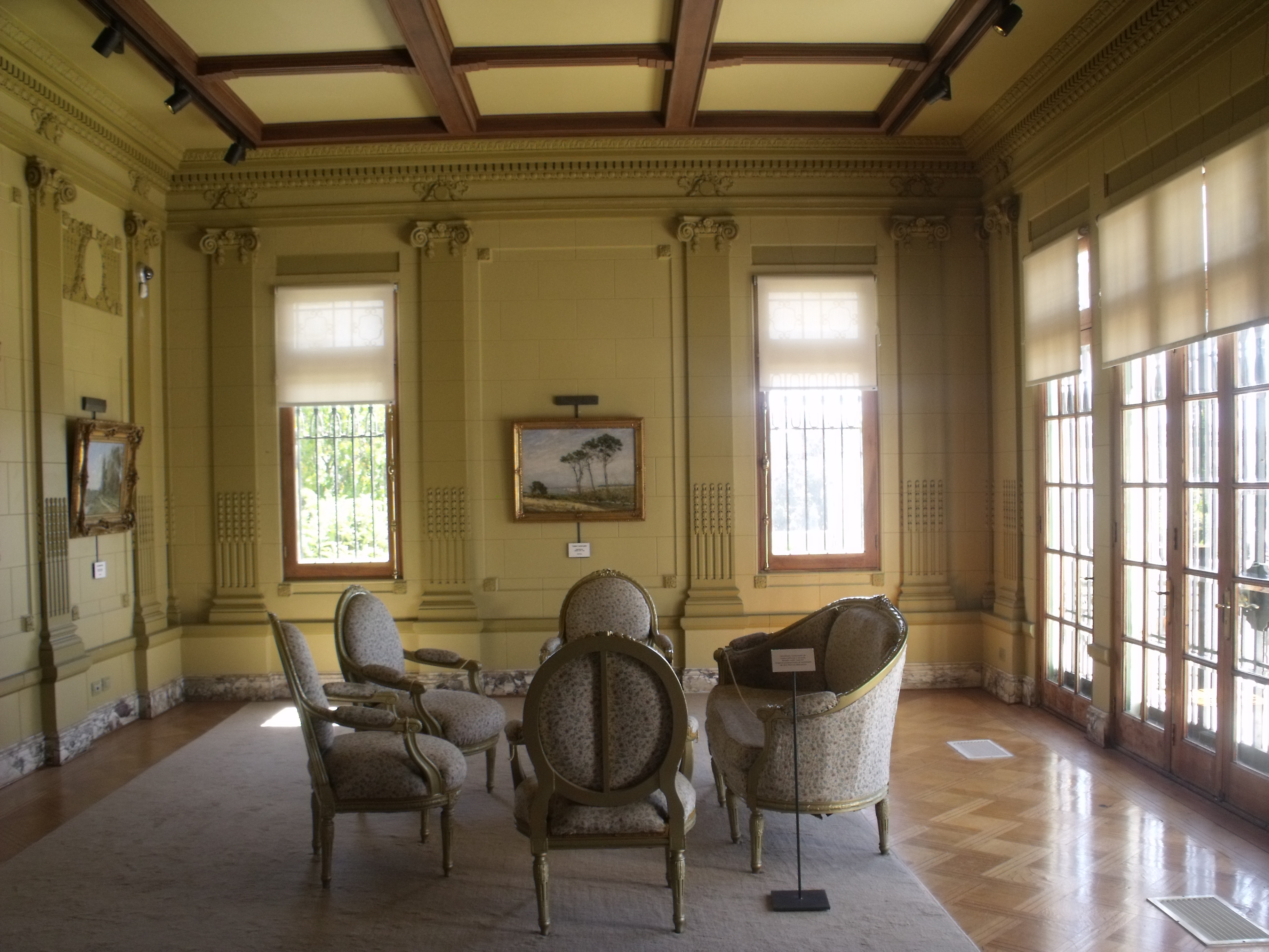 Palacio Baburizza (Museo de bellas artes de Valparaíso)